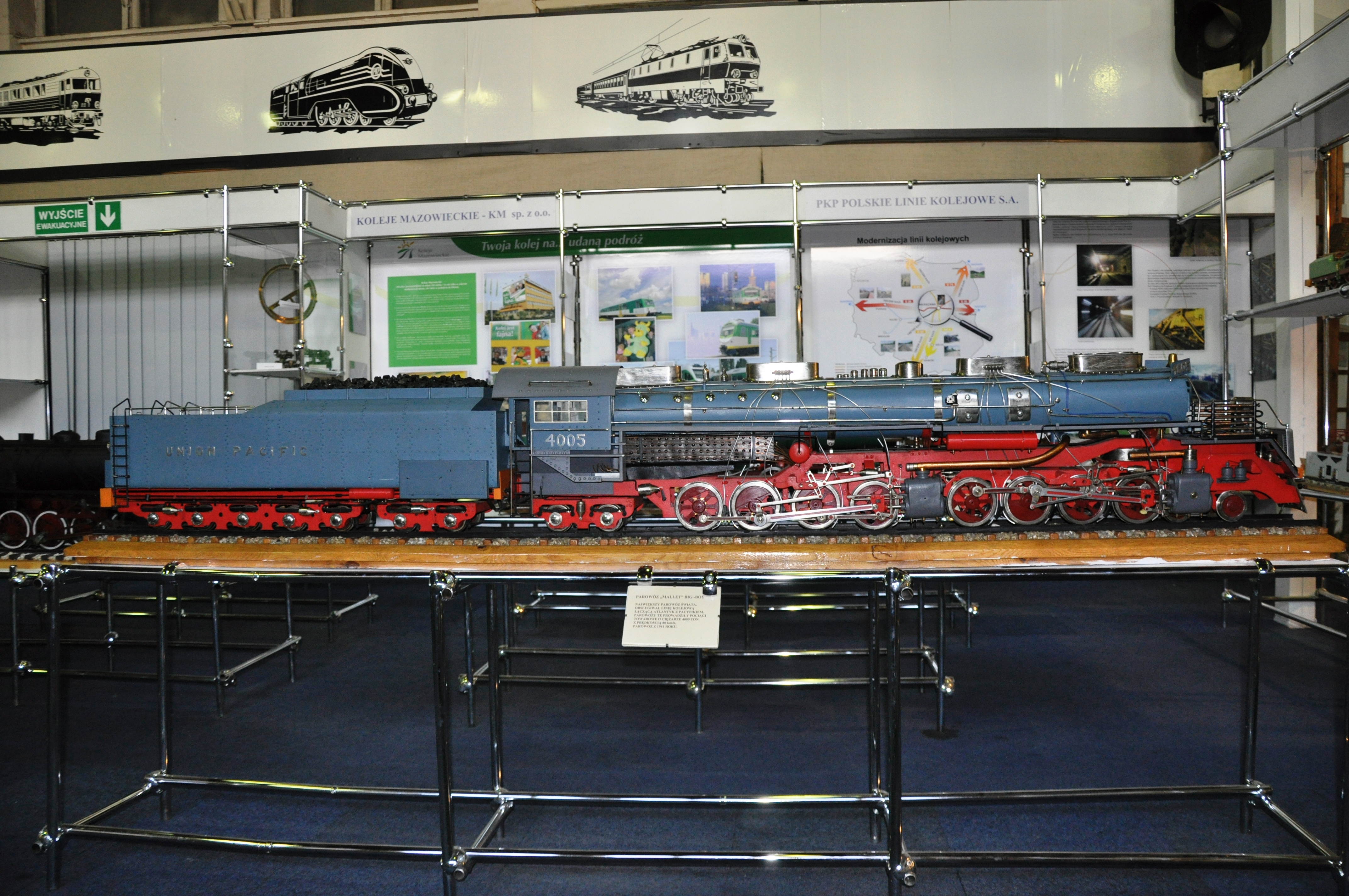 Eisenbahnmuseum Warschau